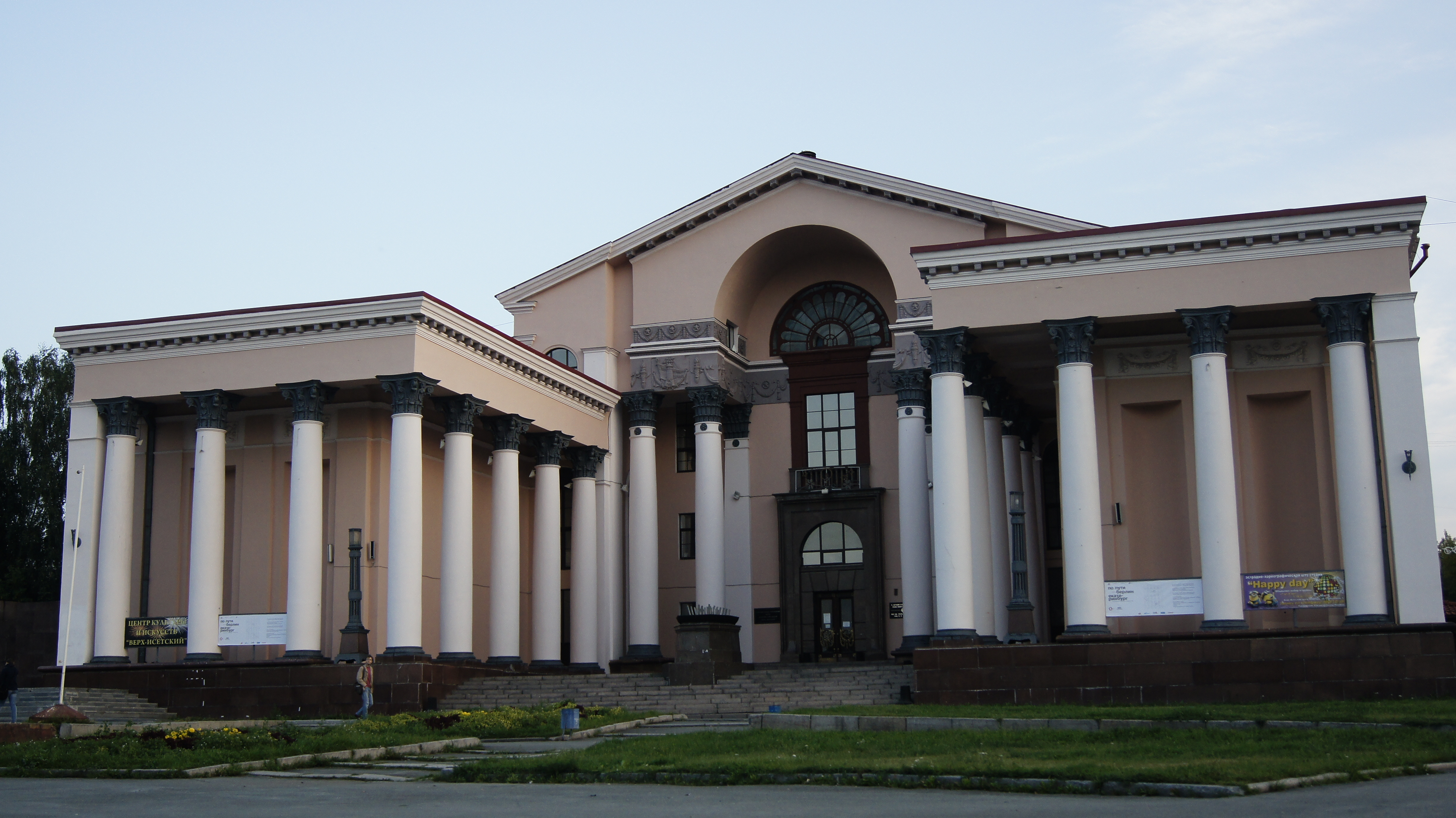 ДК ВИЗа (Свердловская область, Екатеринбург, Субботников площадь)